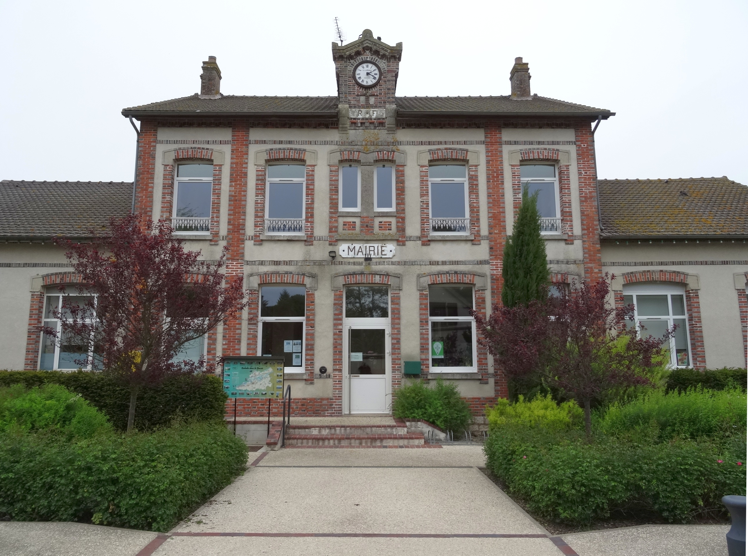 Mairie de Fontaine-Fourches. (Seine-et-Marne, région Île-de-France).